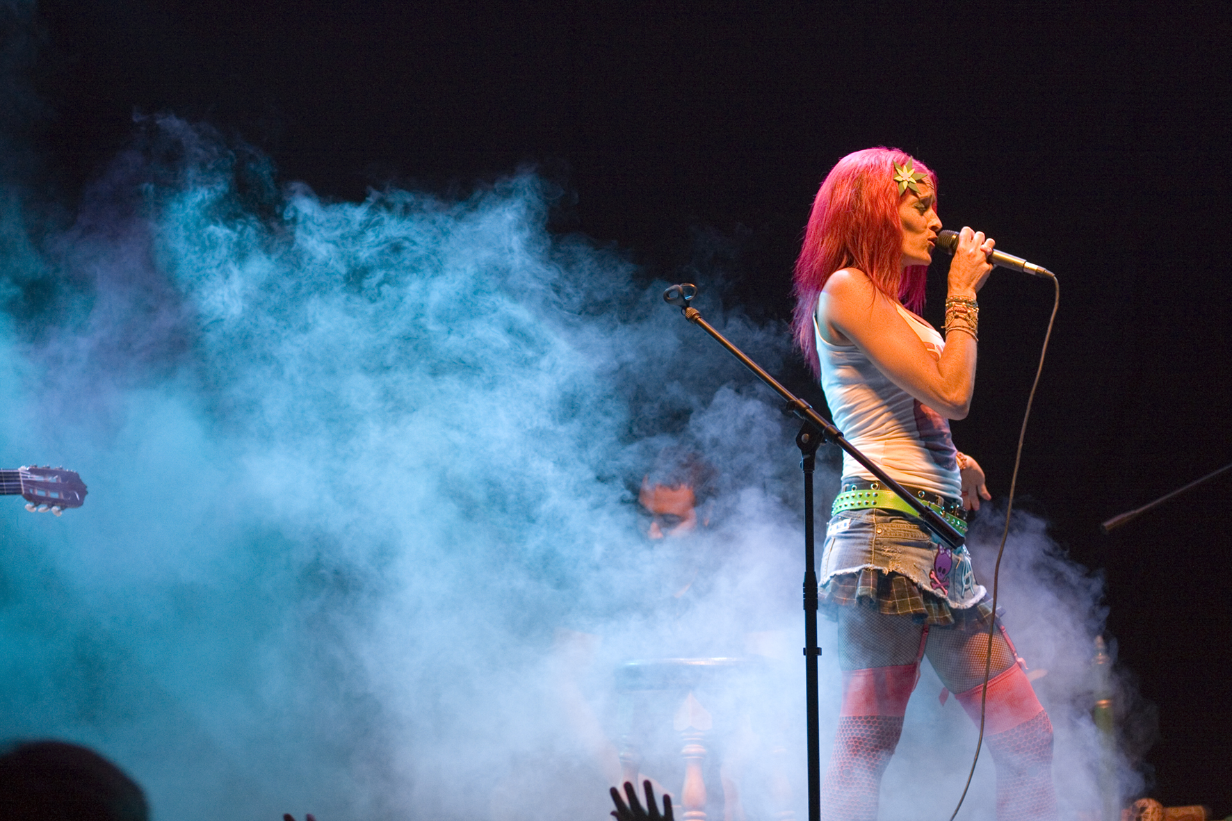 Rakel Winchester en concierto. Fiesta final de Scarpia. Palacio ducal de El Carpio.